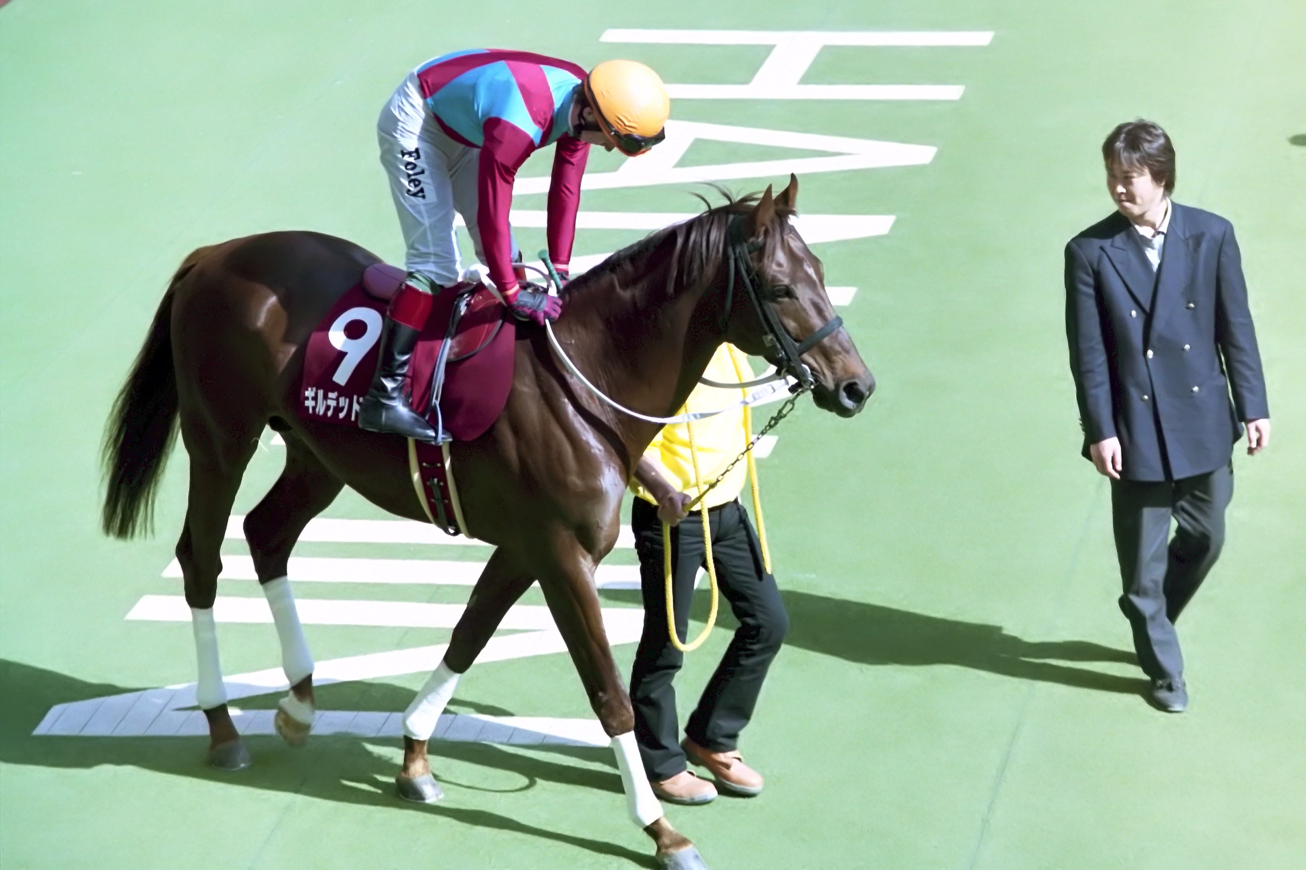 ギルデッドエージ 2004年3月13日 阪神競馬場